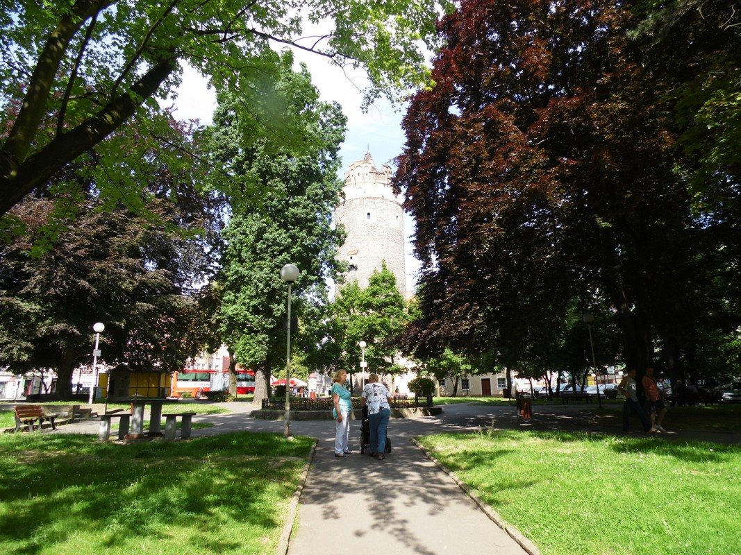 Park.